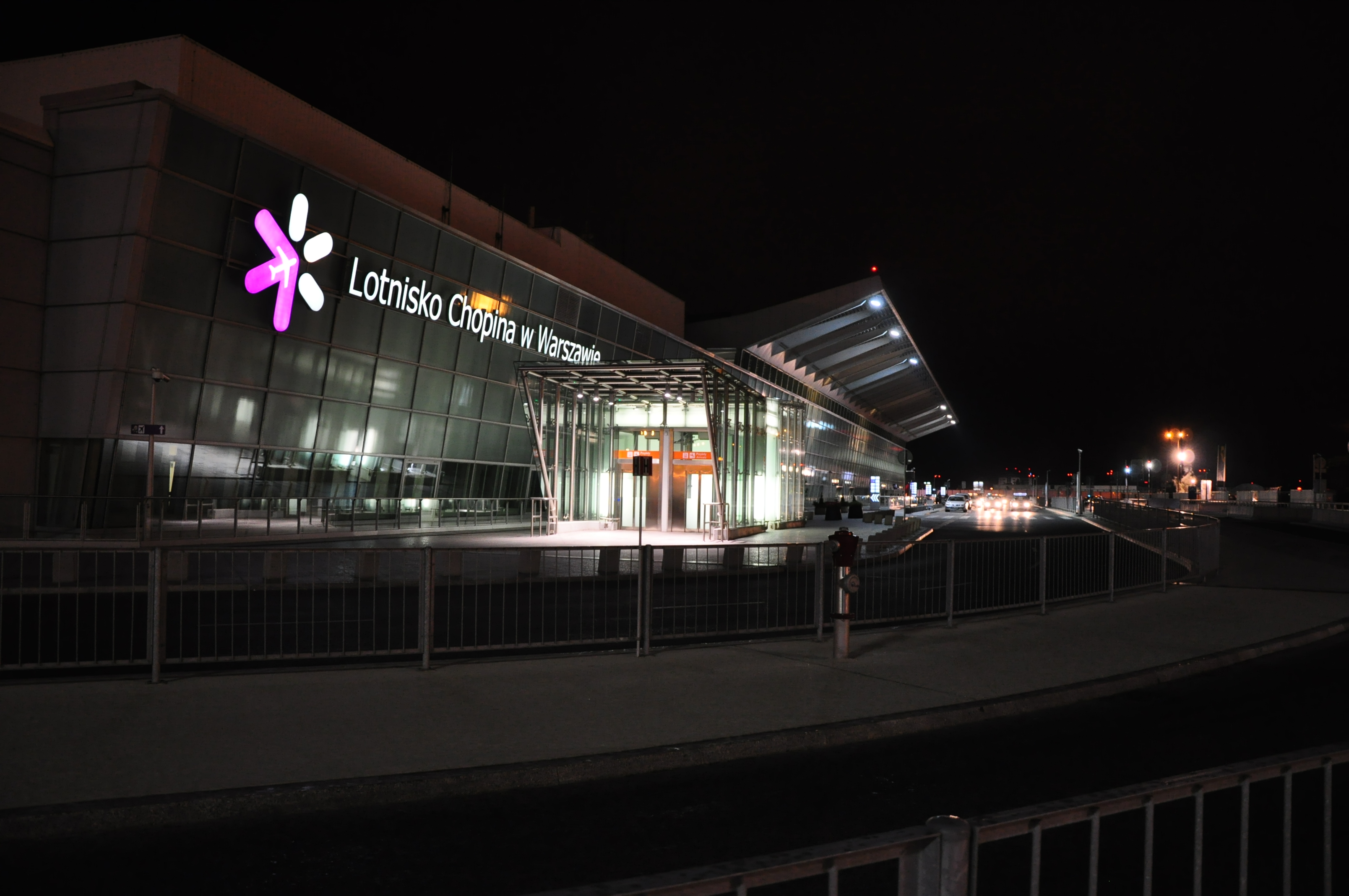 Terminal A, Lotnisko Chopina w Warszawie, ul.Żwirki i Wigury 1.